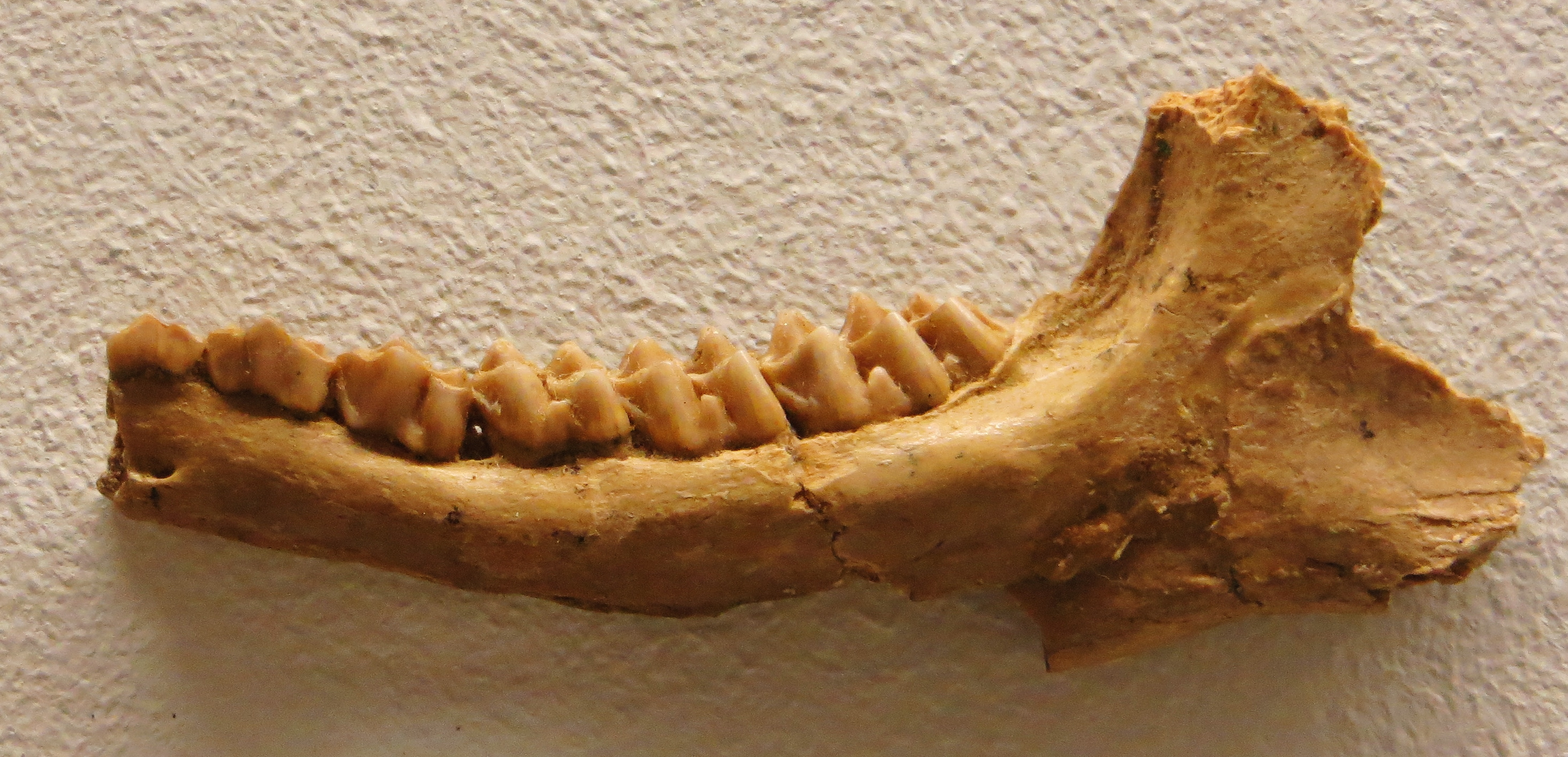 Fossil of Micromeryx, an extinct mammal - Took the picture at Museum of Paleontology, Tuebingen